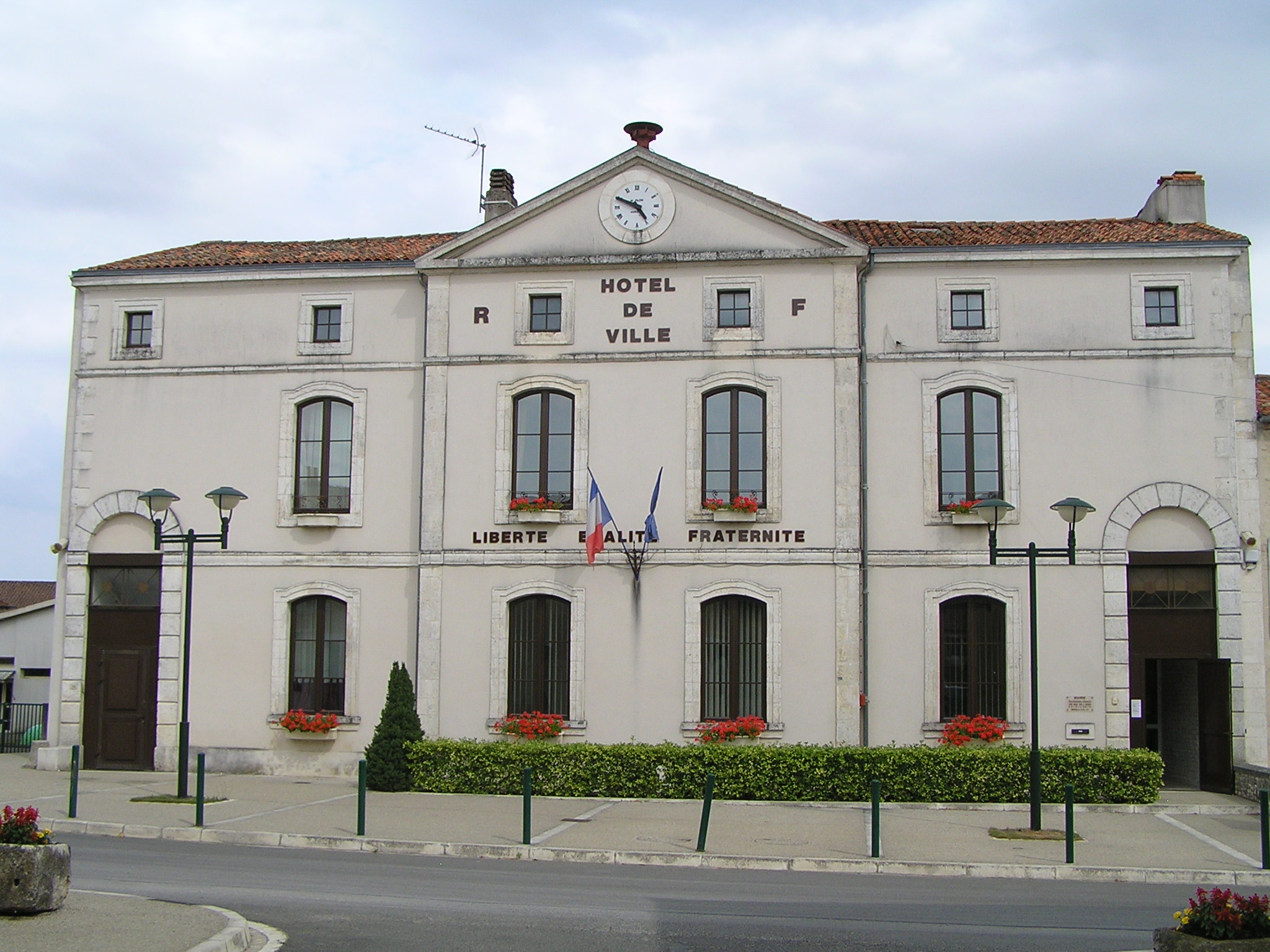 mairie de Villefagnan